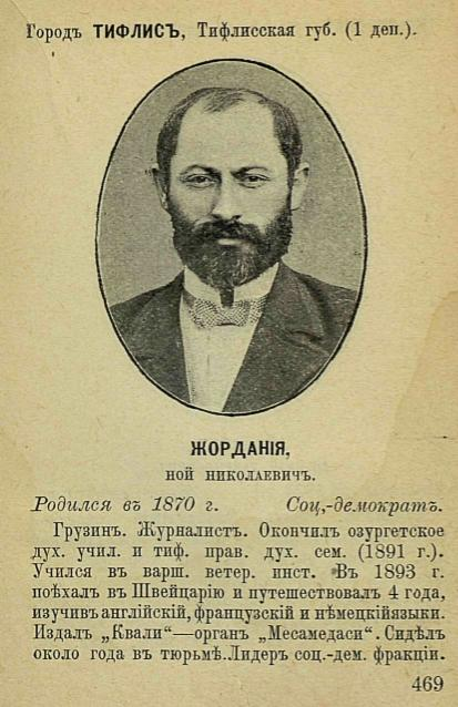 Портрет Жордания, Ной Николаевич